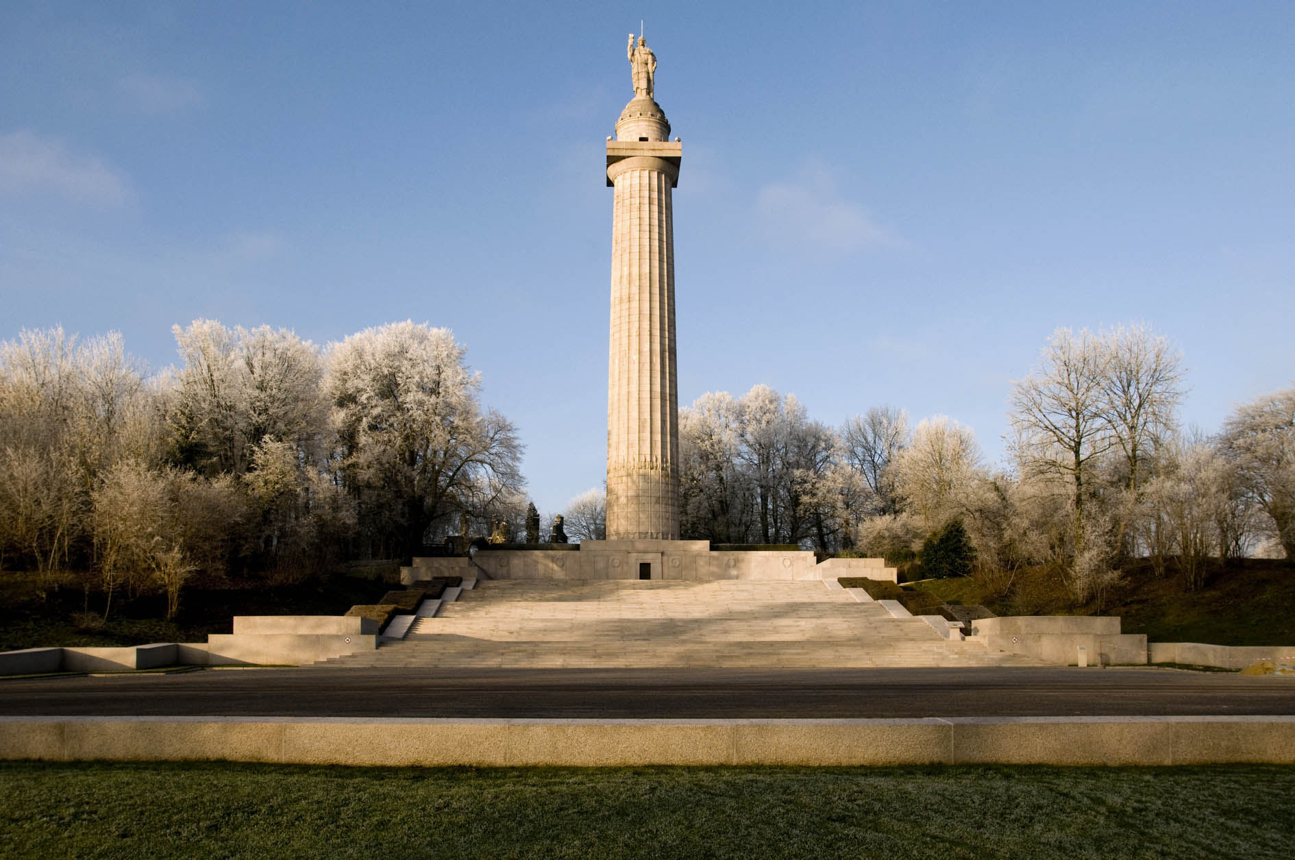 Montfaucon d'Argonne - Het Amerikaans Monument (W.O. I)